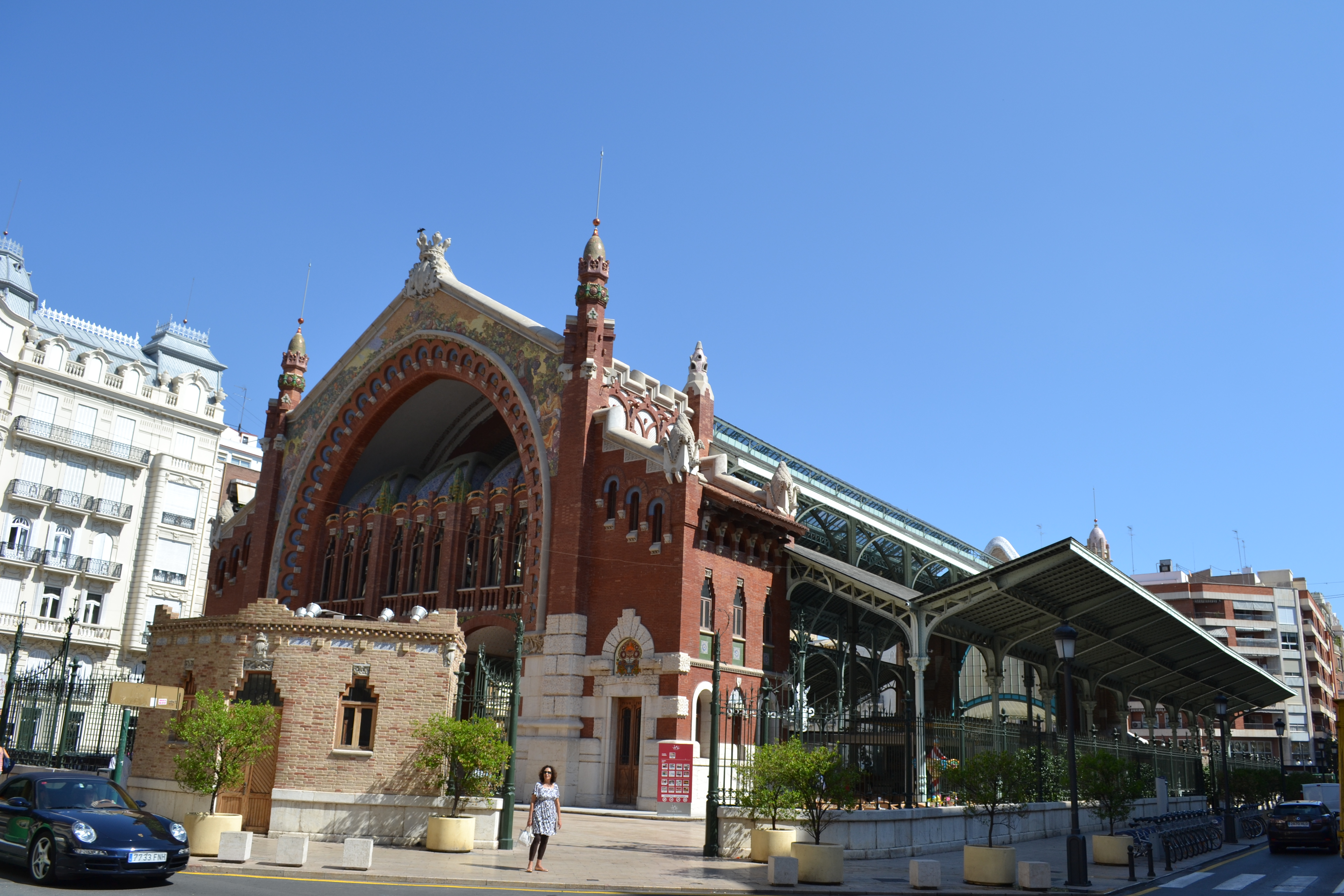 Mercat de Colom (València).